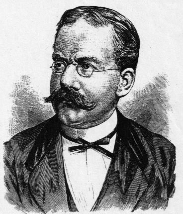 Philipp Zöller (1832–1885), deutscher Agrarwissenschaftler